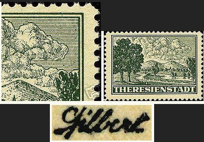 Komplettfälschung der Zulassungsmarke "Böhmen und Mähren" Nr. 1 "Theresienstadt"